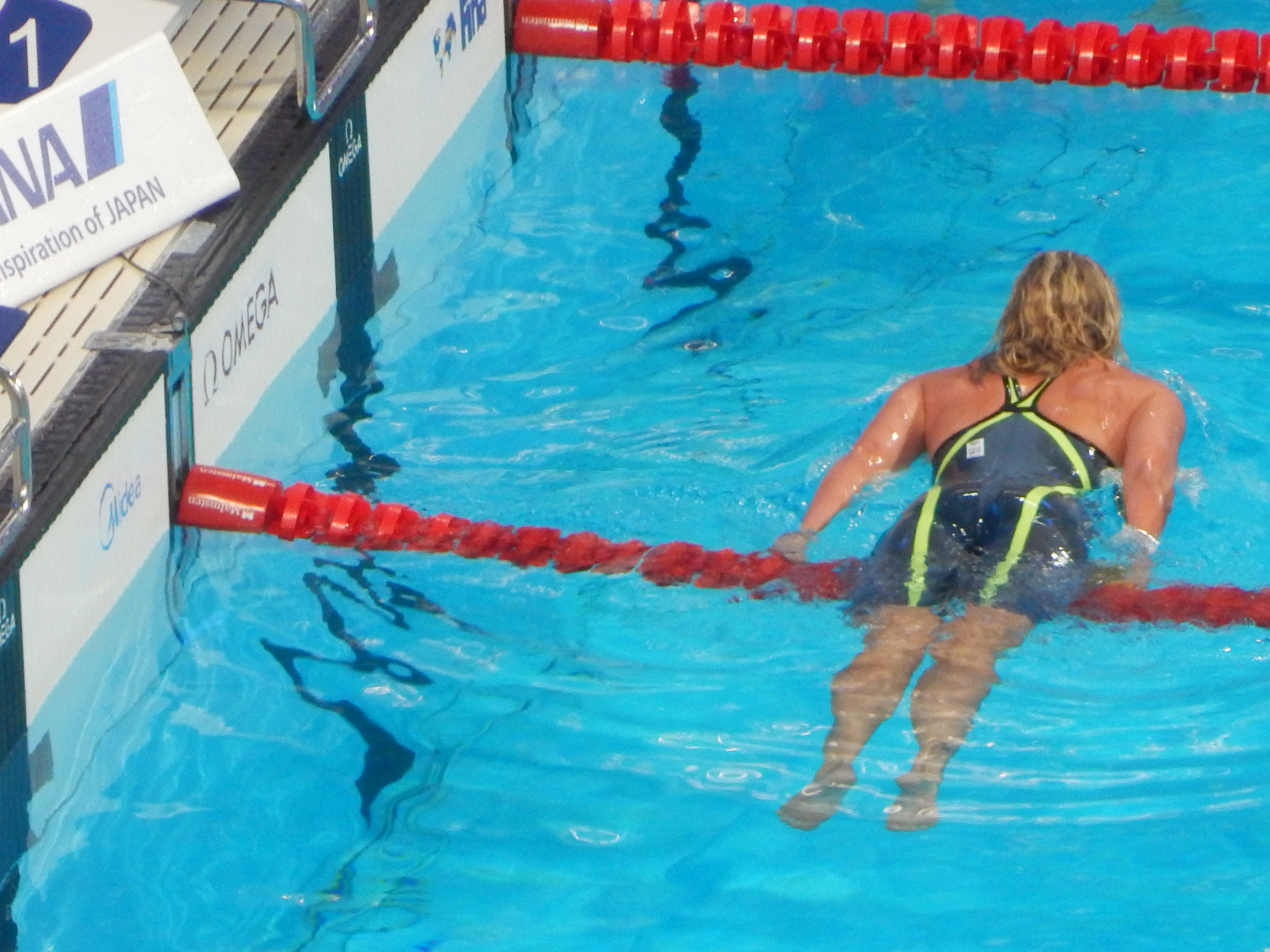 Мишель Колман на чемпионате мира в Казани